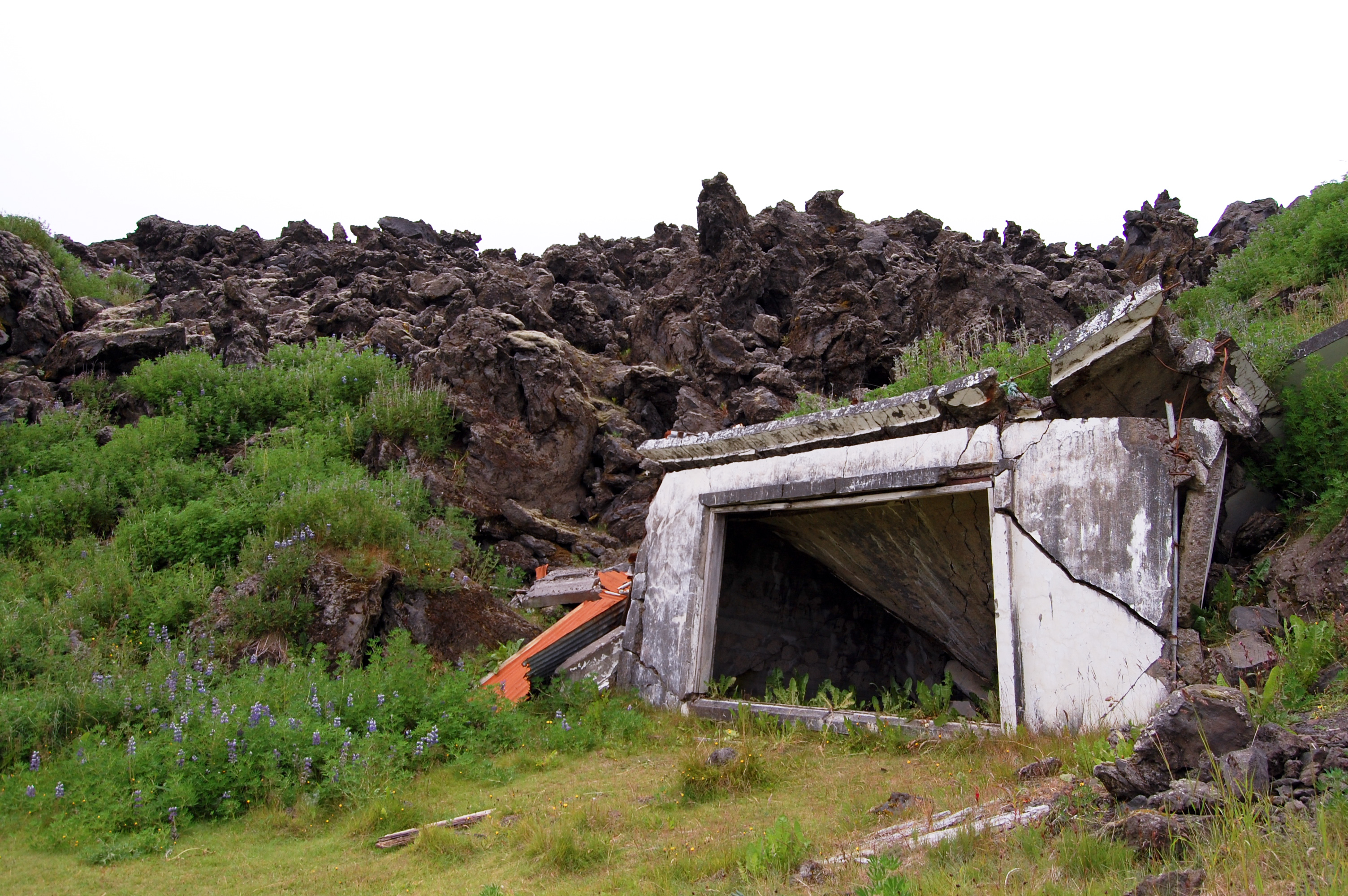 Heimaey (off Iceland), house under the lava